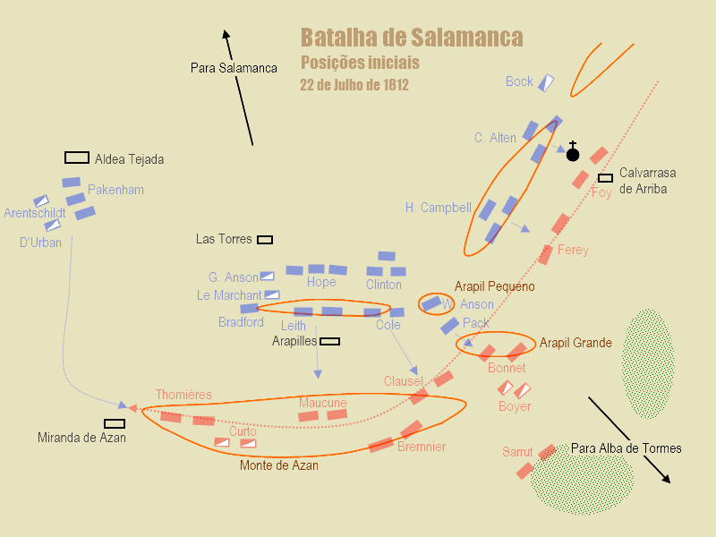 Esquema representativo das posições das principais unidades dos exércitos de Wellington e de Marmont no início da Batalha de Salamanca